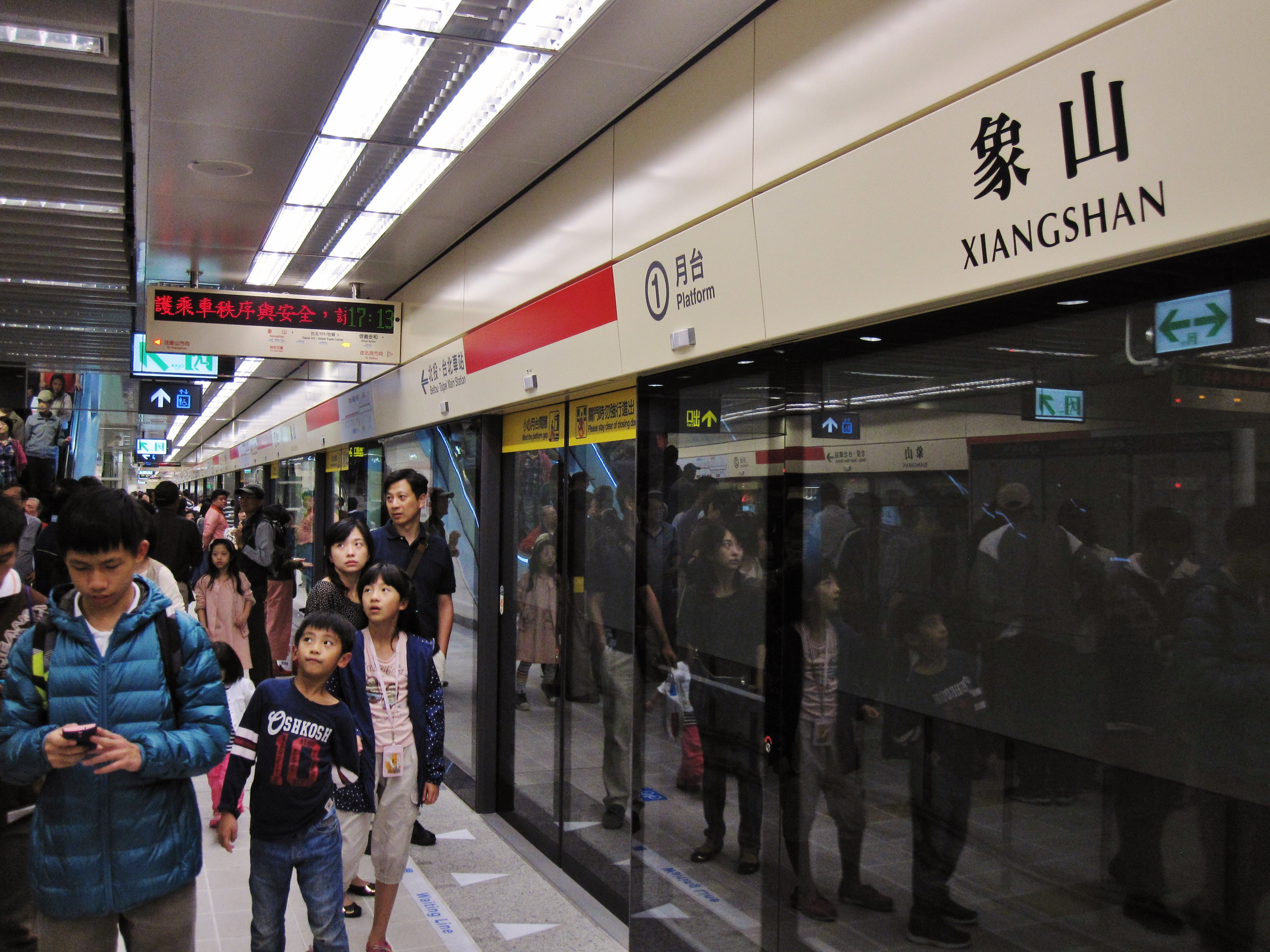 台北捷運信義線象山站月台1。